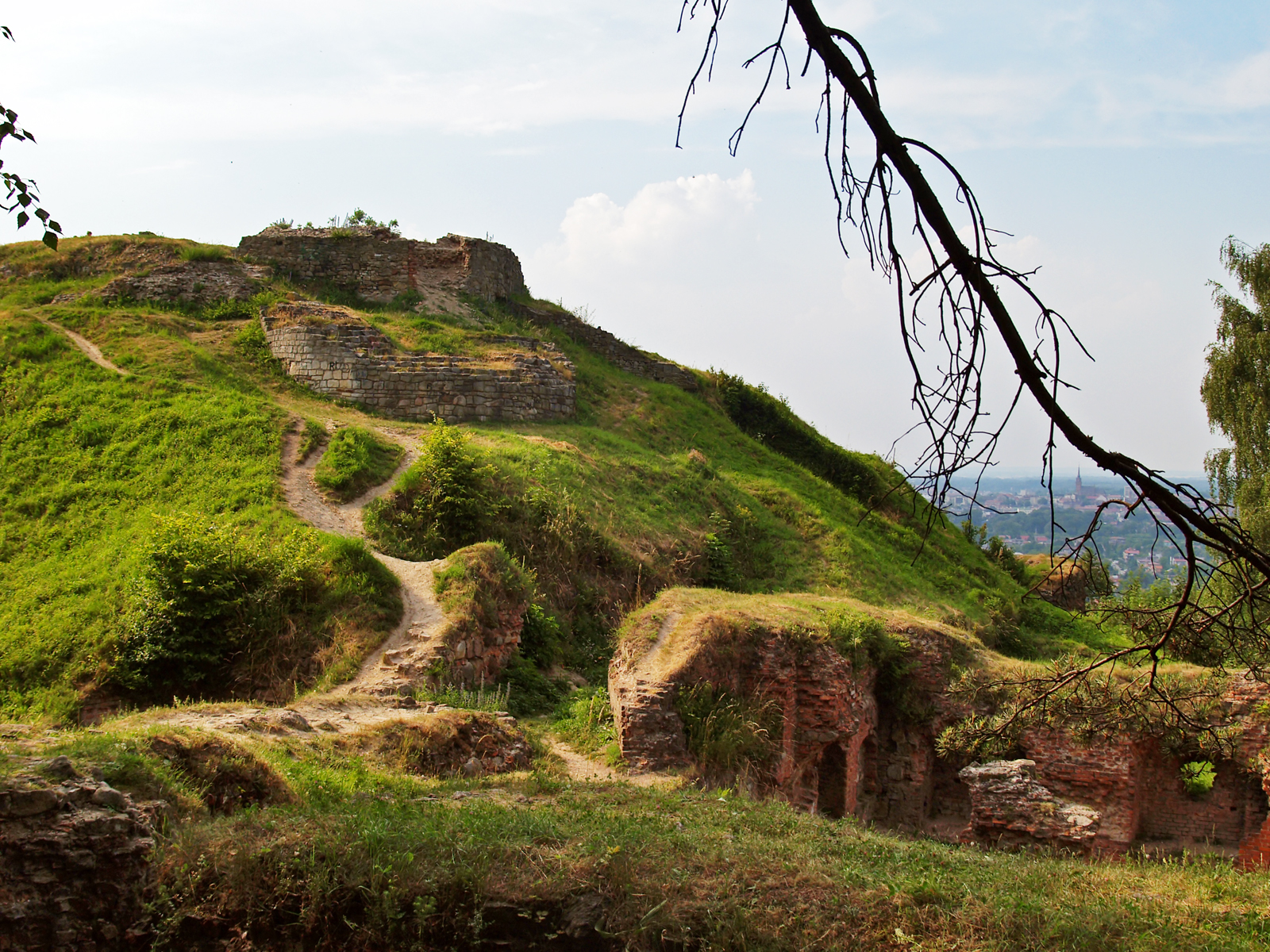 Tarnów, ul. Wypoczynkowa - ruiny średniowiecznego zamku na Górze Świętego Marcina (zabytek nr A-119 z 5.10.1976)